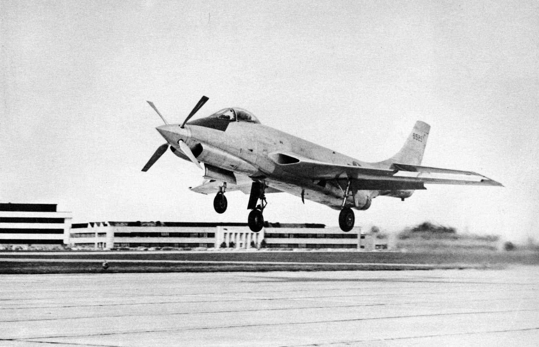 McDonnell XF-88B (SN 46-525) turboprop landing